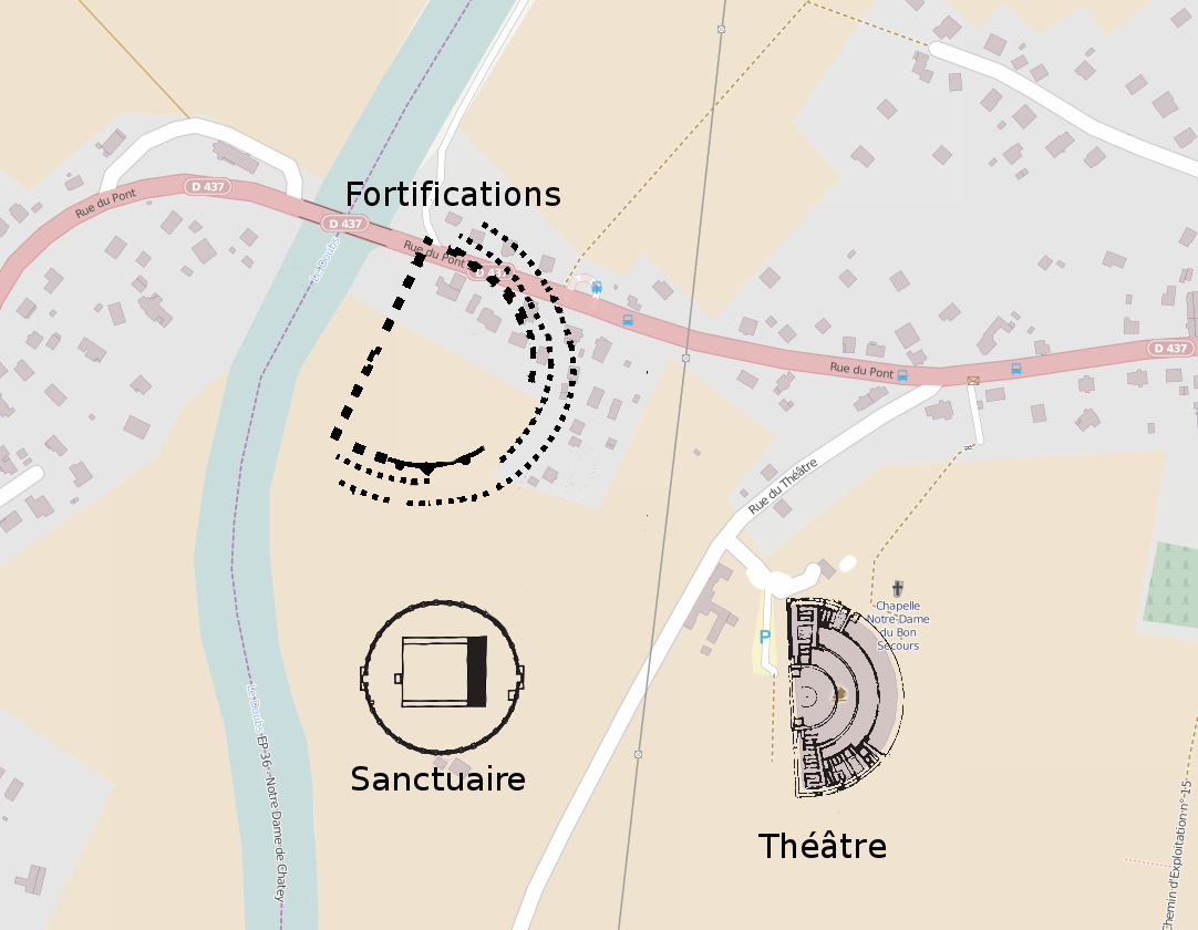 Disposition des éléments antiques du quartier du clos du château de la cité antique d'Epomanduodurum (Mandeure, France)